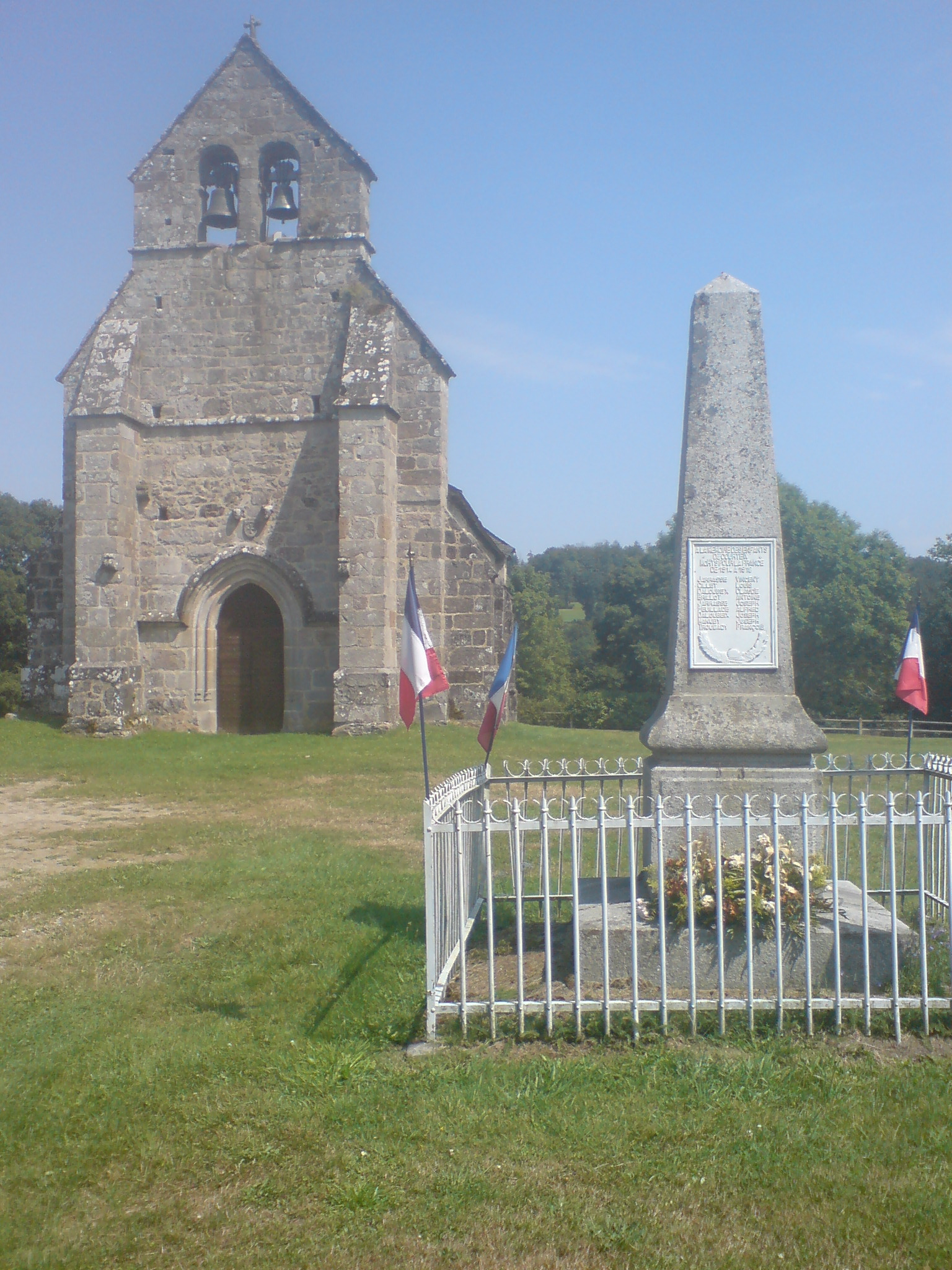 Façade de l’église Saint-Pierre-ès-Liens, de Courteix, France. Initialement, c’est une chapelle templière (Ordre du Temple) du XIIIe siècle, plusieurs fois remaniée par la suite, jusqu’au XXe siècle. Clocher-mur, contreforts de façade.